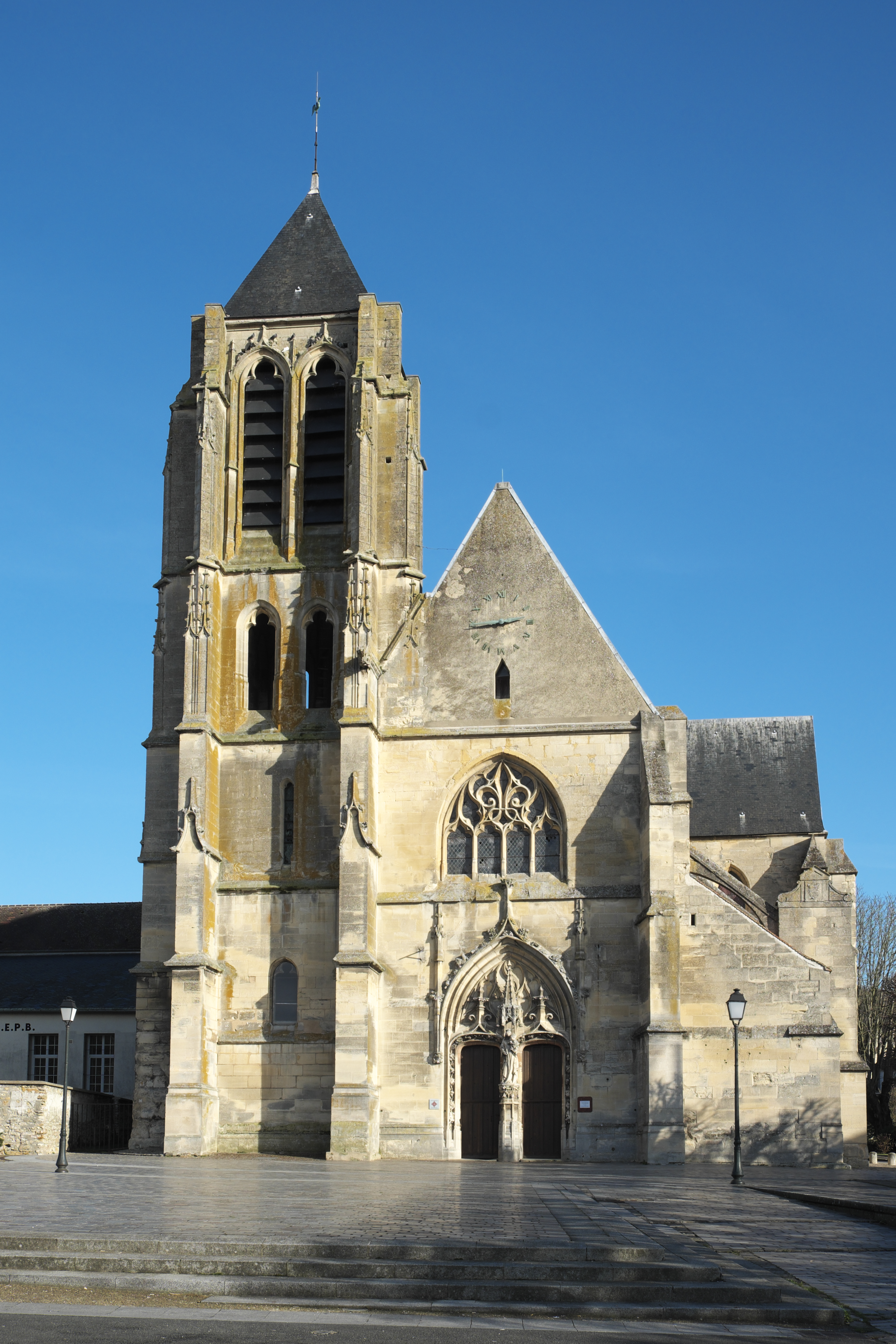 Katholische Pfarrkirche Saint-Gervais-Saint-Protais in Bessancourt im Département Val-d’Oise (Île de France/Frankreich), Westfassade